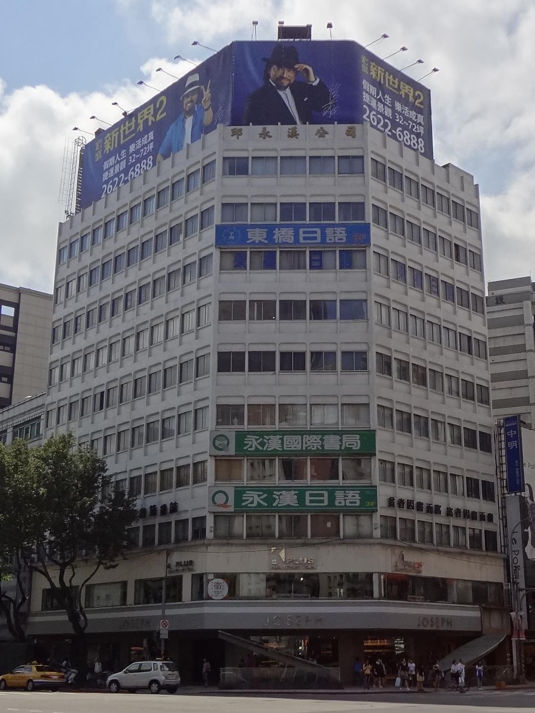 永漢大樓，位於臺北市中山區中山北路一段152號。